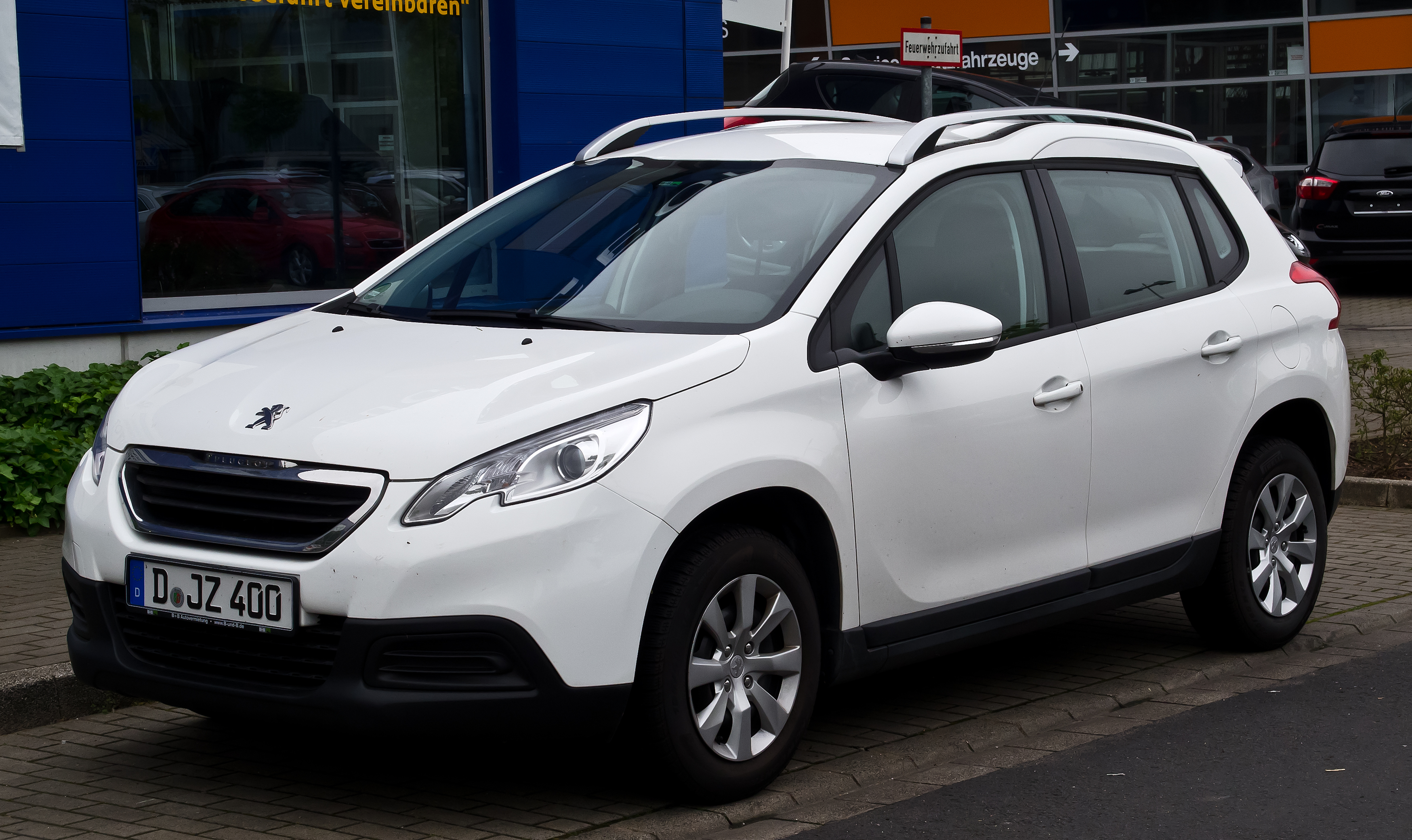 Peugeot 2008 82 VTi Access